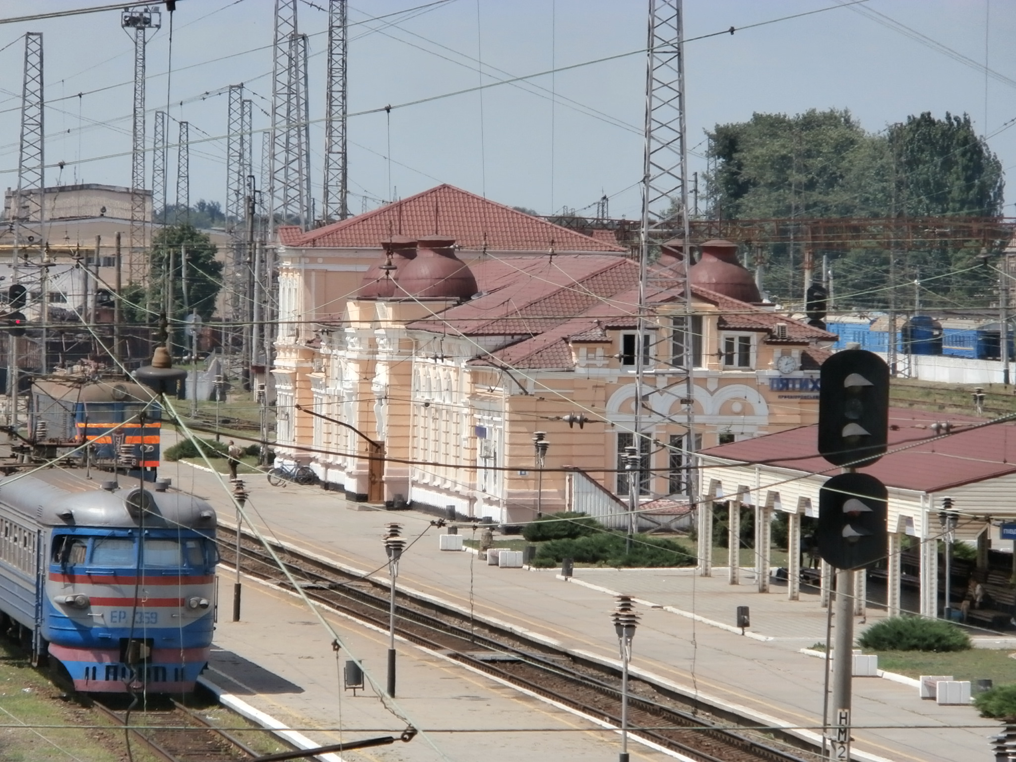 Pjatychatky Bahnhof